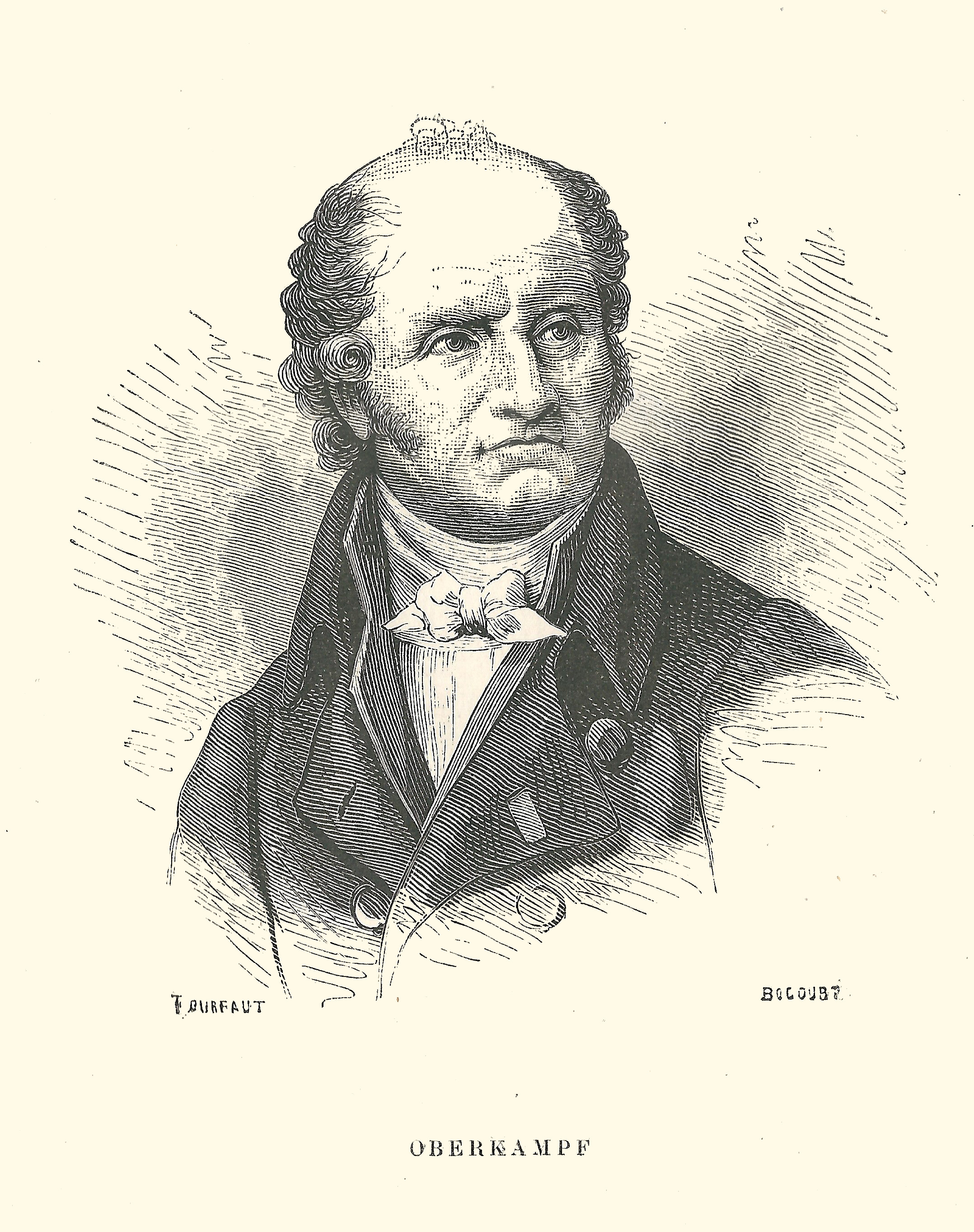 Portrait de Christophe-Philippe Oberkampf.